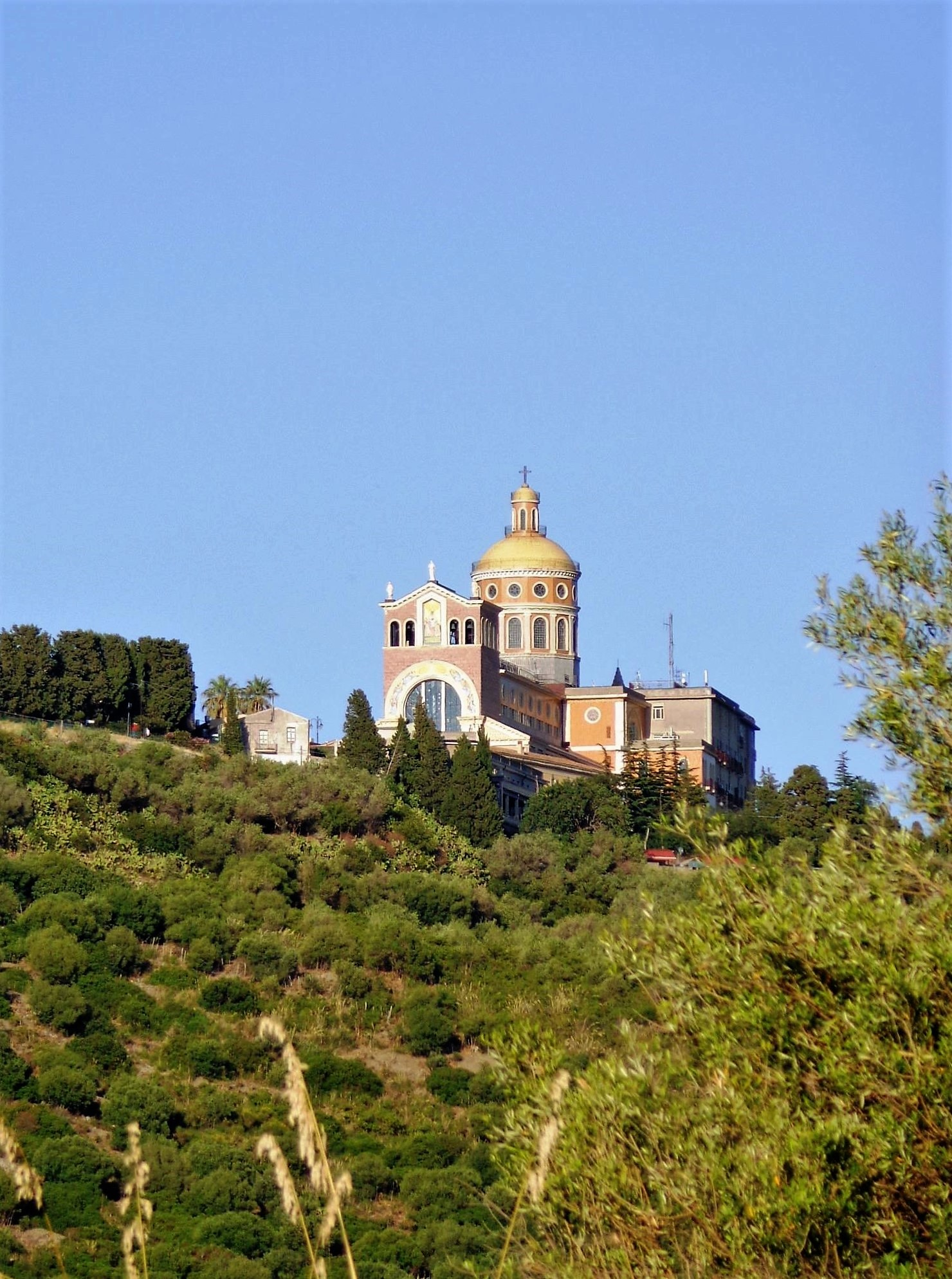 Santuario di Tindari, veduta dalla rotabile direzione Patti